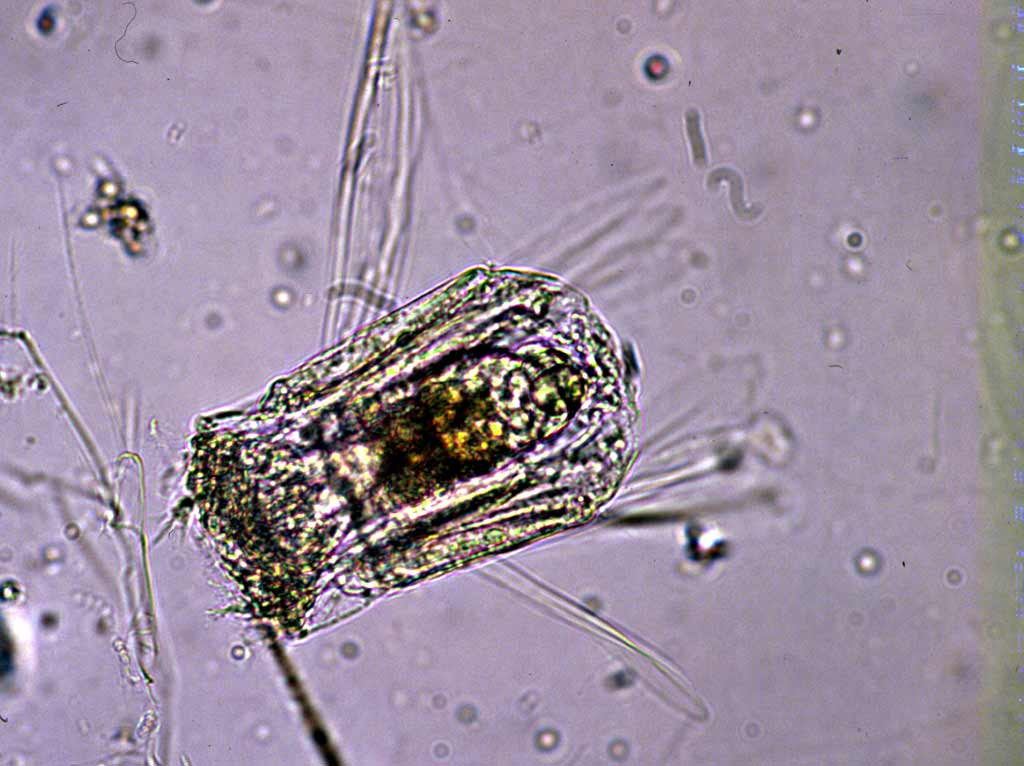 Polyarthra